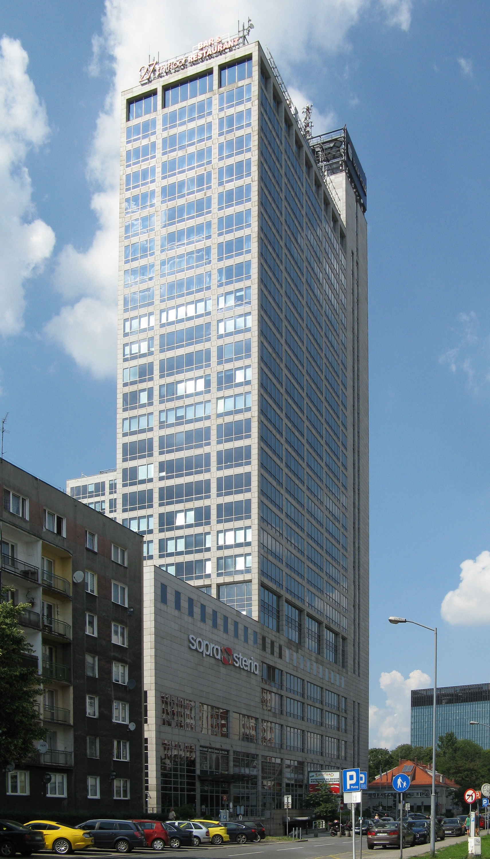 Wieżowiec Altus w Katowicach widziany z ul. Stanisława Moniuszki.